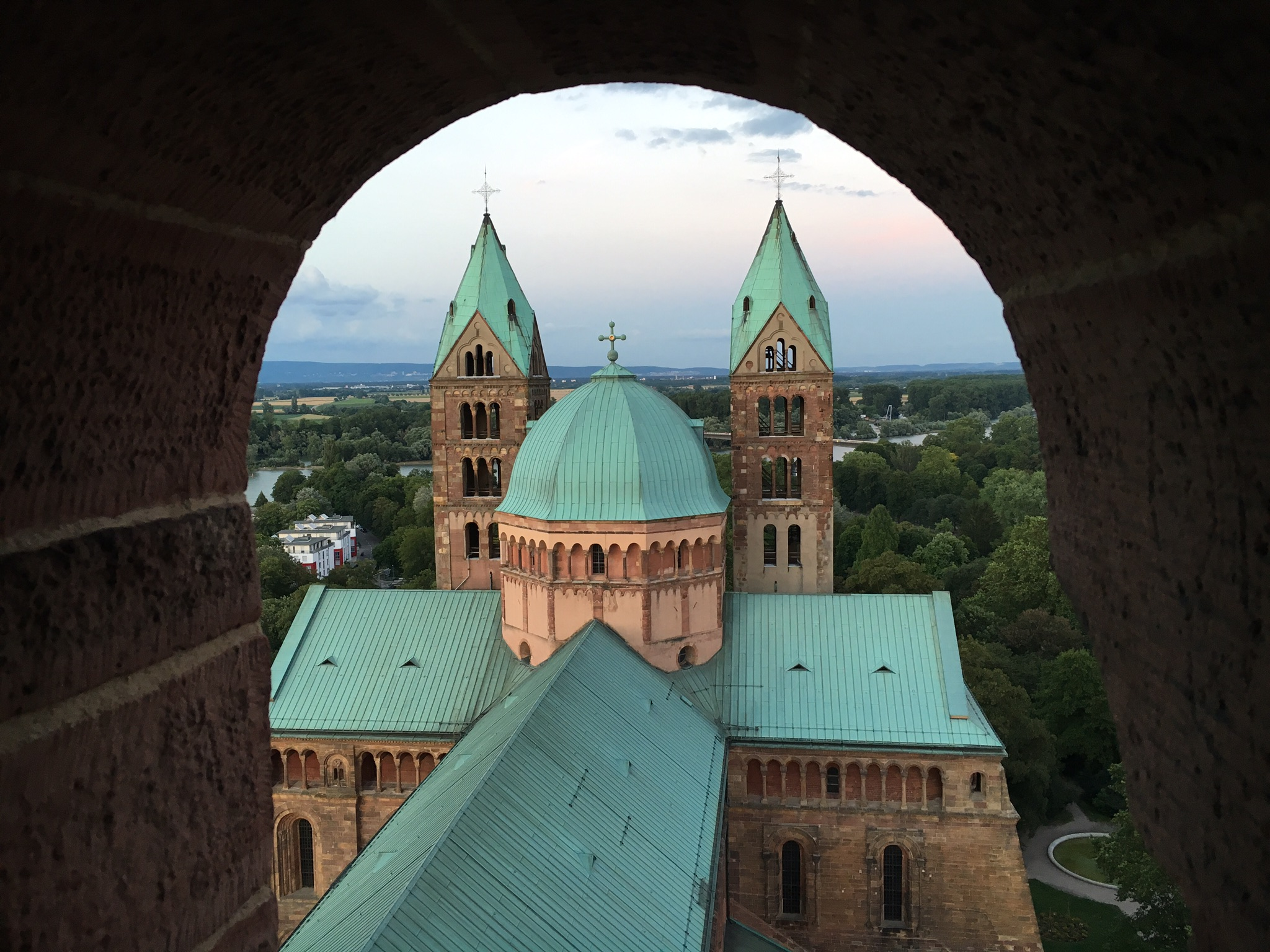 Ausblick auf die Türme des Dom zu Speyer Im Hintergrund der Rhein